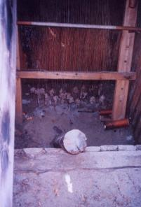 Grophus med stående vävstol, rekonstruerat i Gene fornby - 2 Stående vävstol